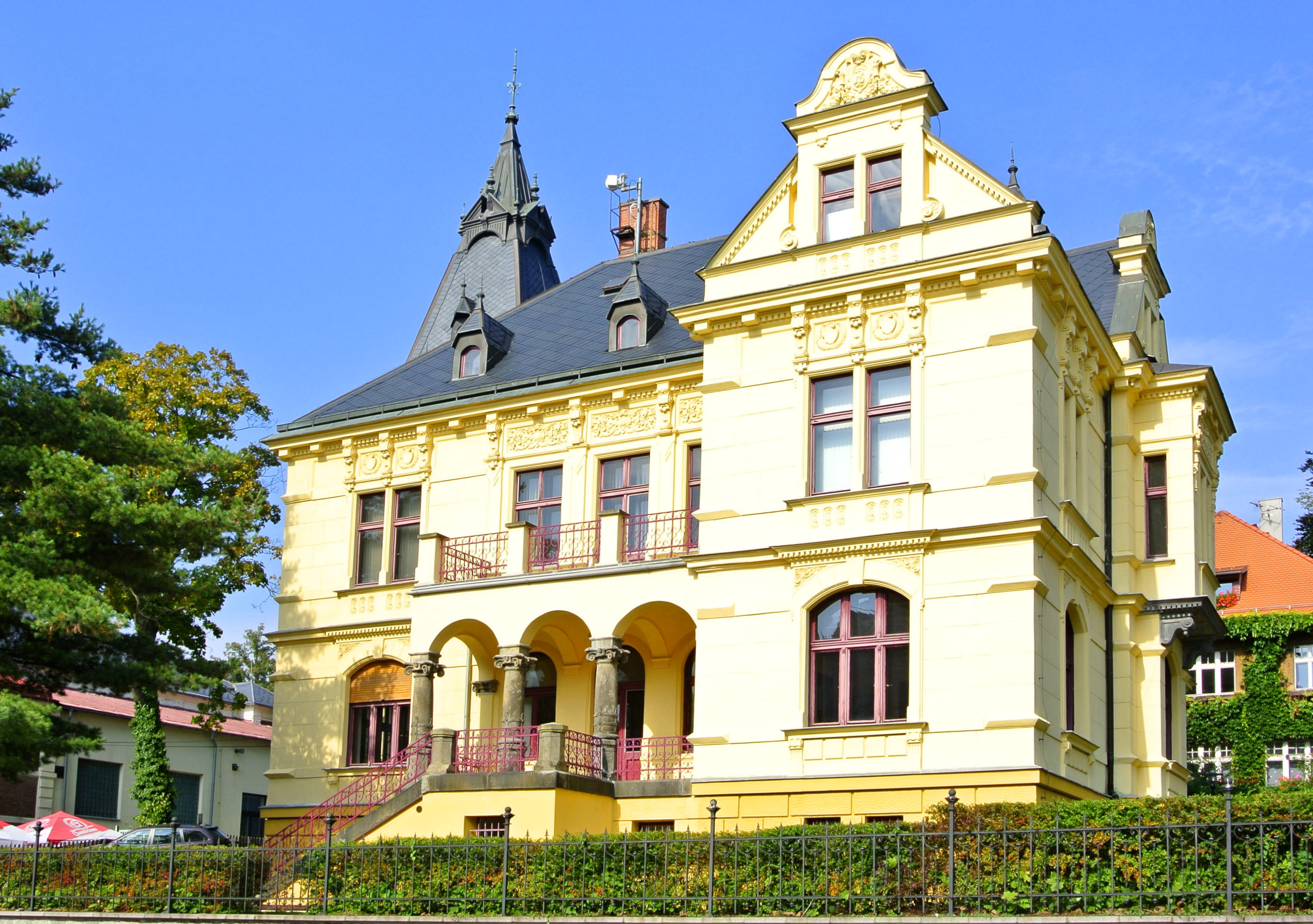 Vila Jablonecká 642/23, Jablonecká 642/23, Klášterní 642/1, Staré Město, Liberec.